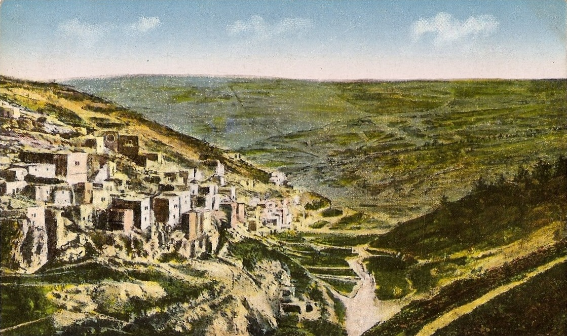 Silwan